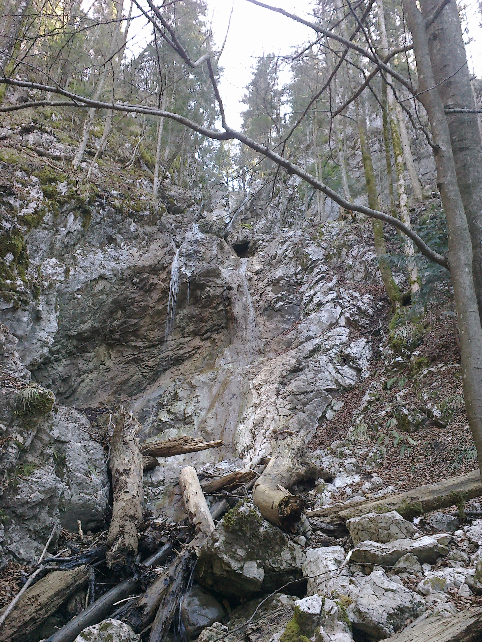 Slap Kobilji Curek v sušnem obdobju; spodnja in nad njo zgornja stopnja.